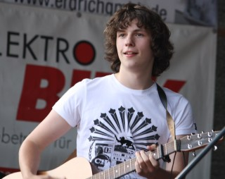 Dominik Büchele am 1.6.2009 während eines Konzertes in Oppenau, Kreis Freiburg i.Br.